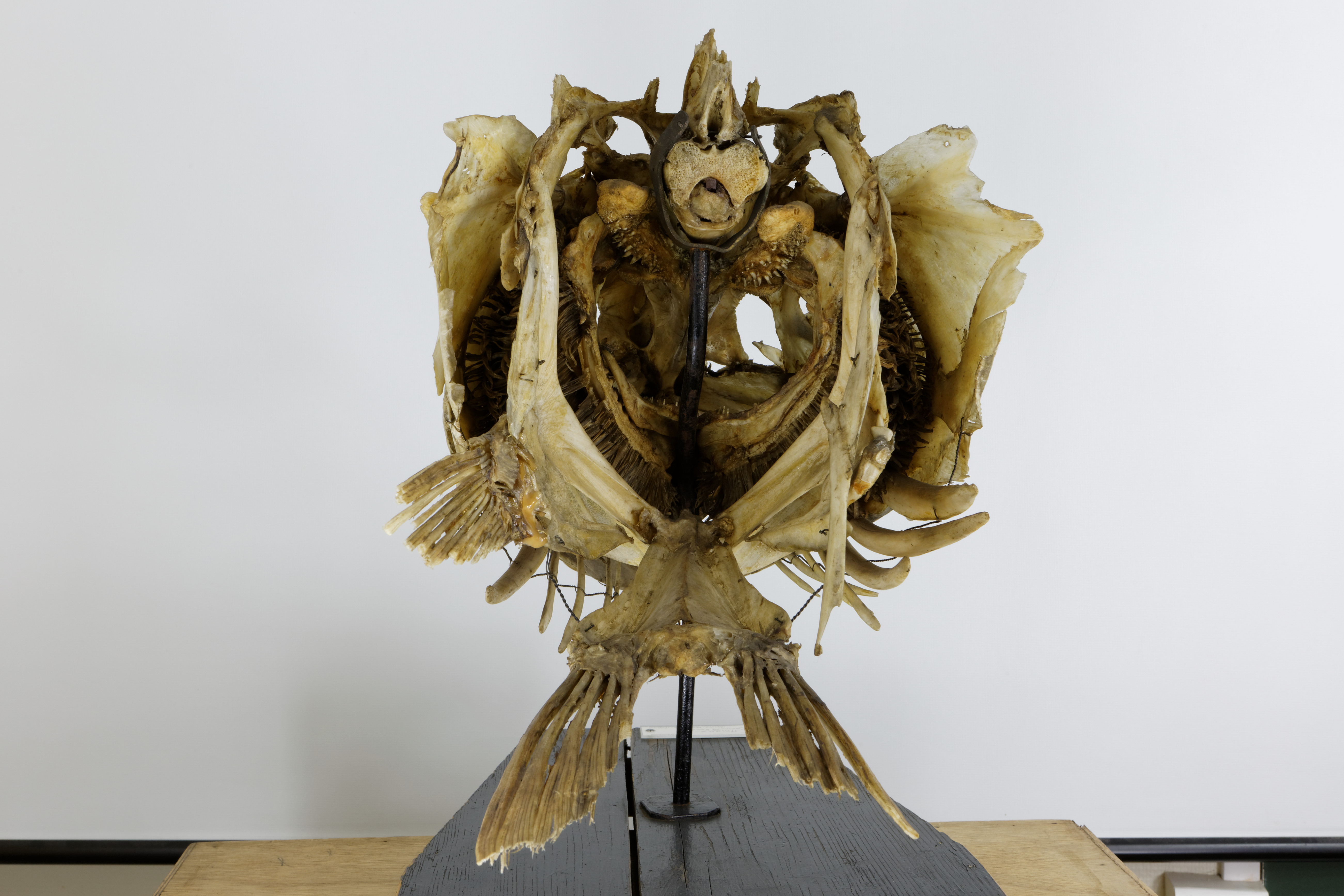 collection de l'Université Pierre-et-Marie-Curie à Paris.